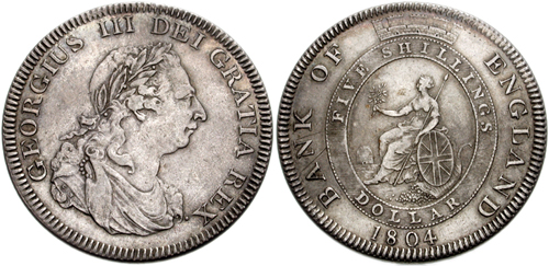 5 shillings , Dollar , 1804 bank of england